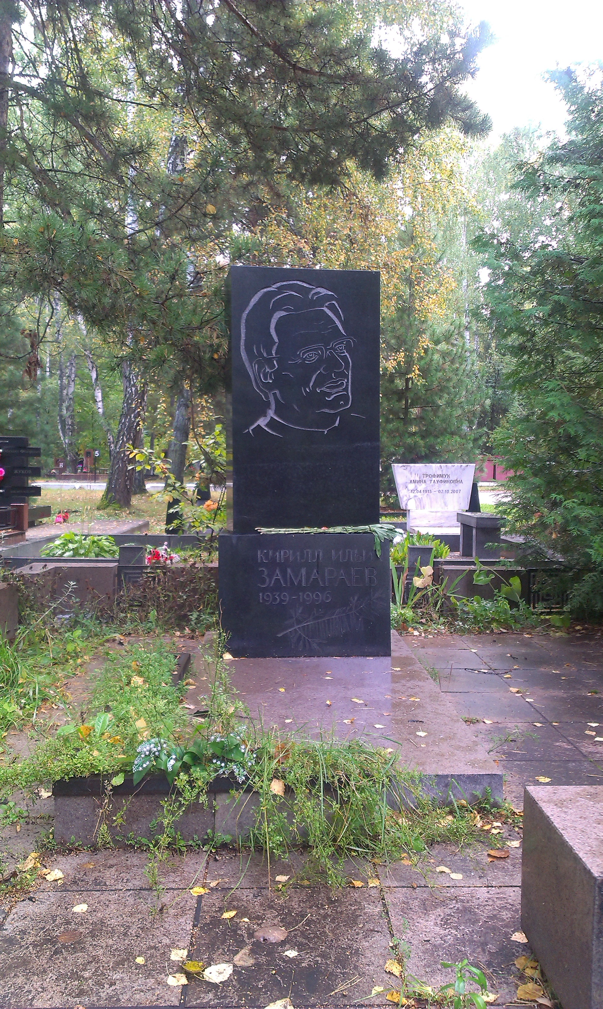 Южное (Чербузинское) кладбище